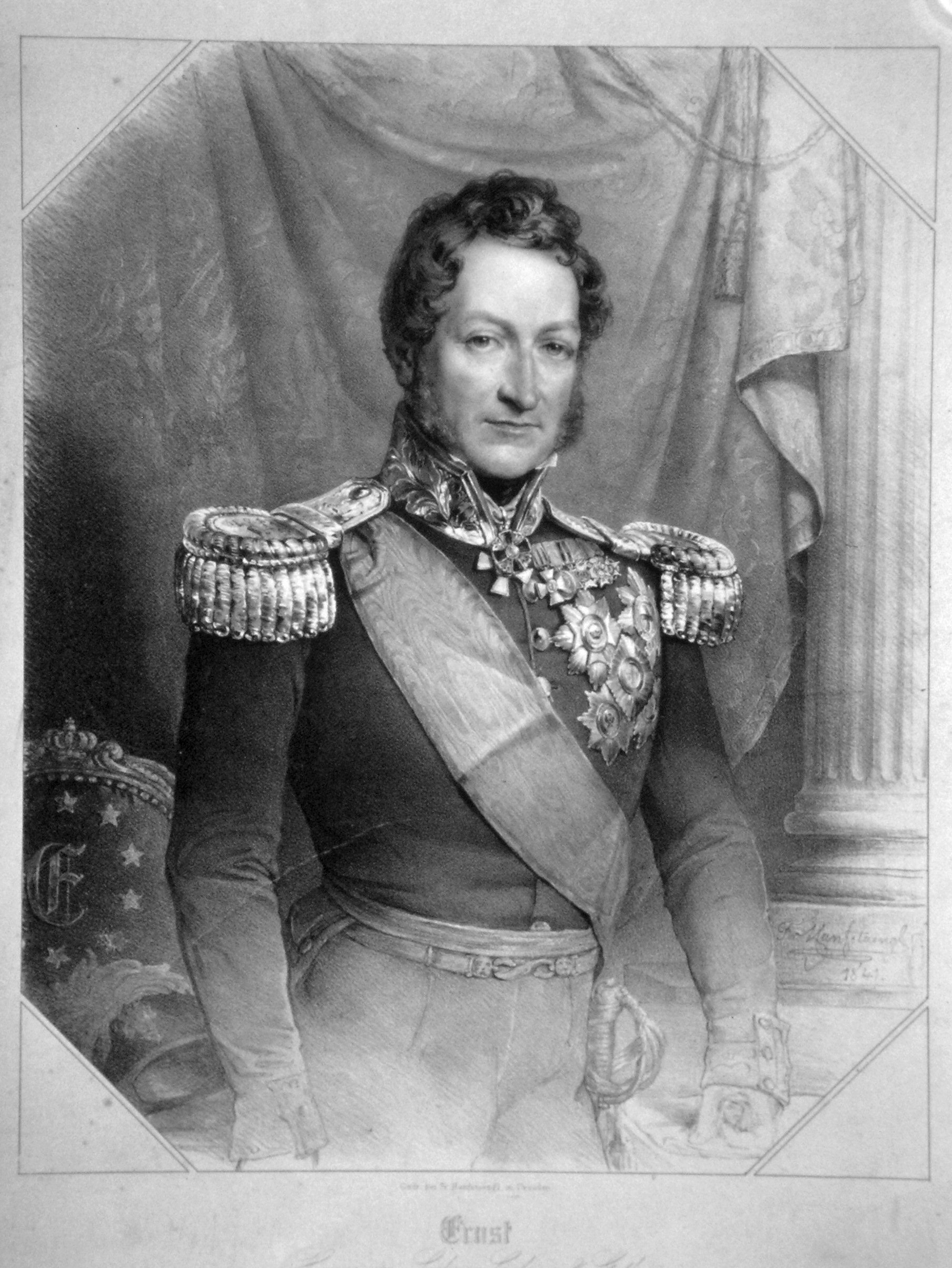 Herzog Ernst I. von Sachsen-Coburg und Gotha, Lithographie von Franz Hanfstaengl, 1841